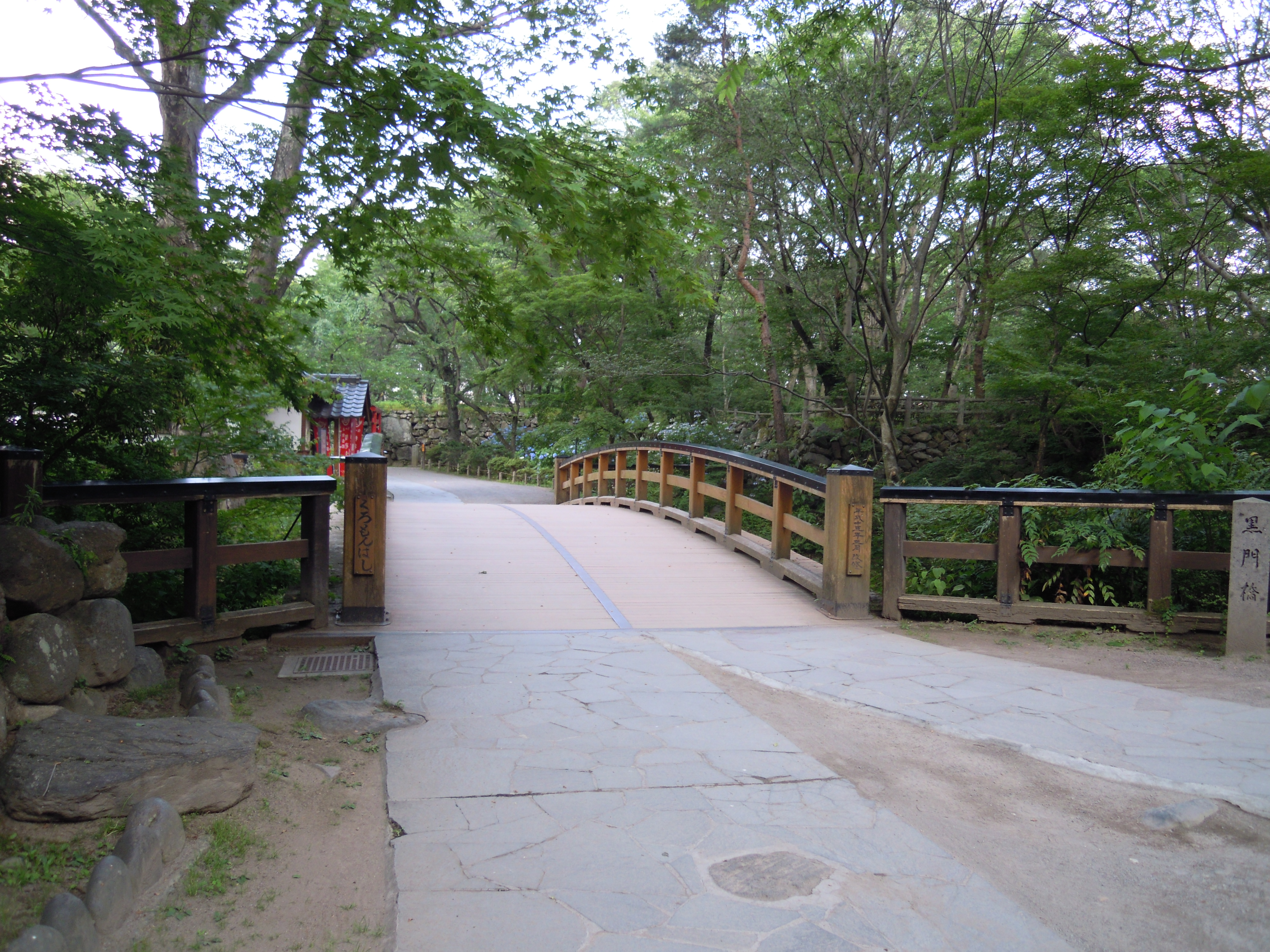 懐古園（小諸市）の黒門橋